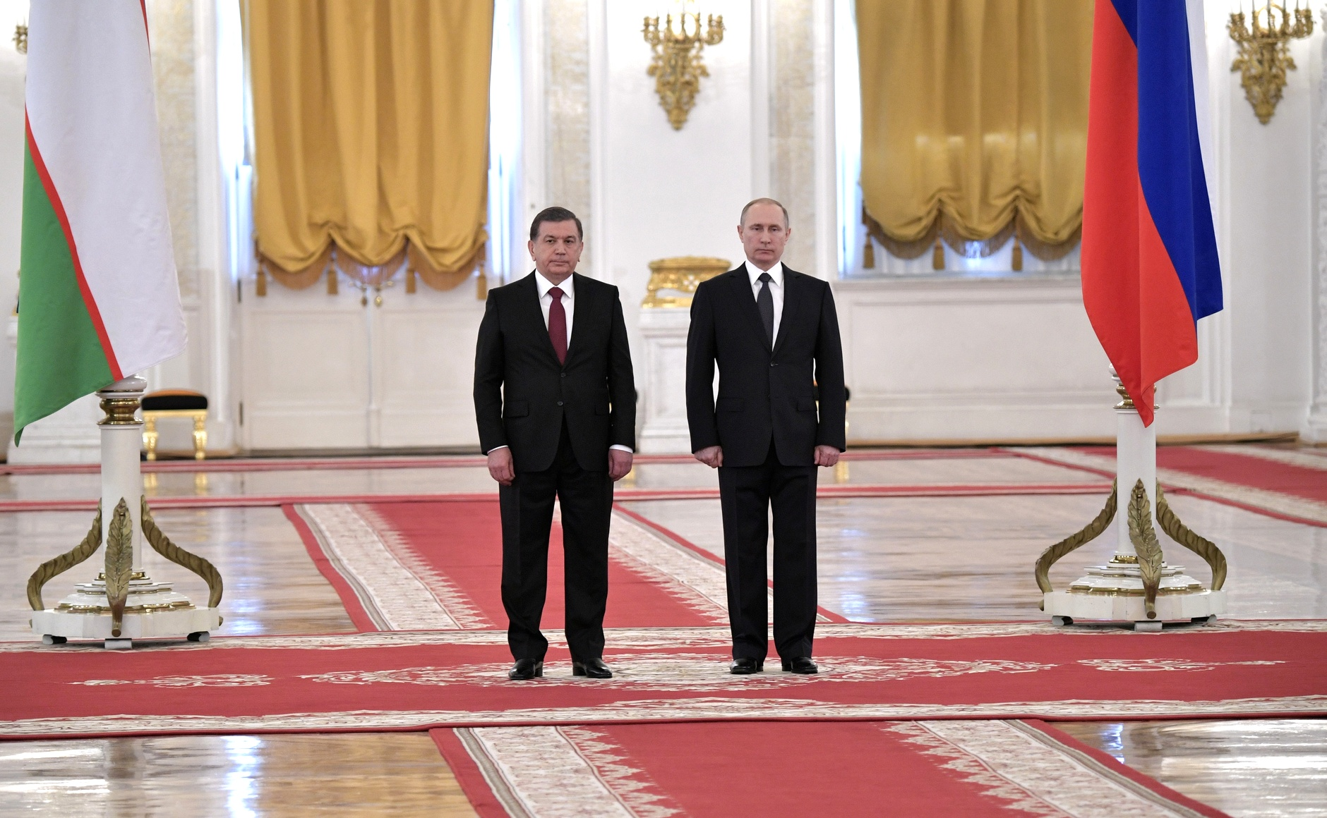 Президент России Владимир Путин с Президентом Узбекистана Шавкатом Мирзиёевым